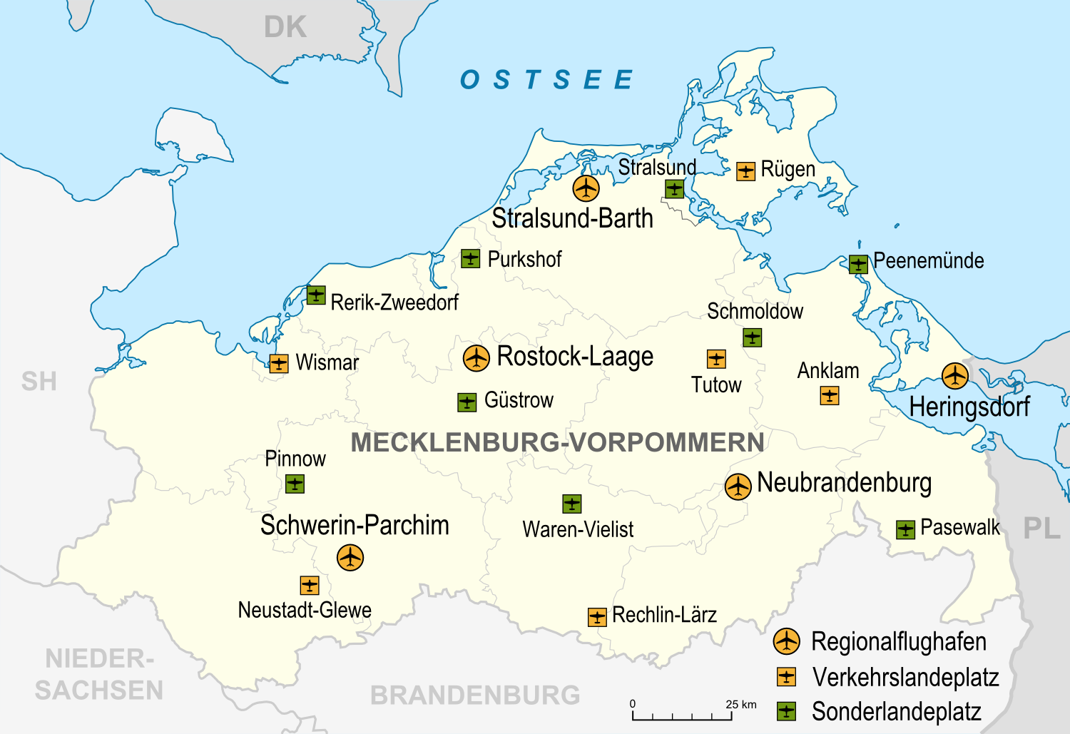 Flughäfen, Verkehrslandeplätze, Sonderlandeplätze und Wasserlandeplätze in Mecklenburg-Vorpommern, Stand 2007